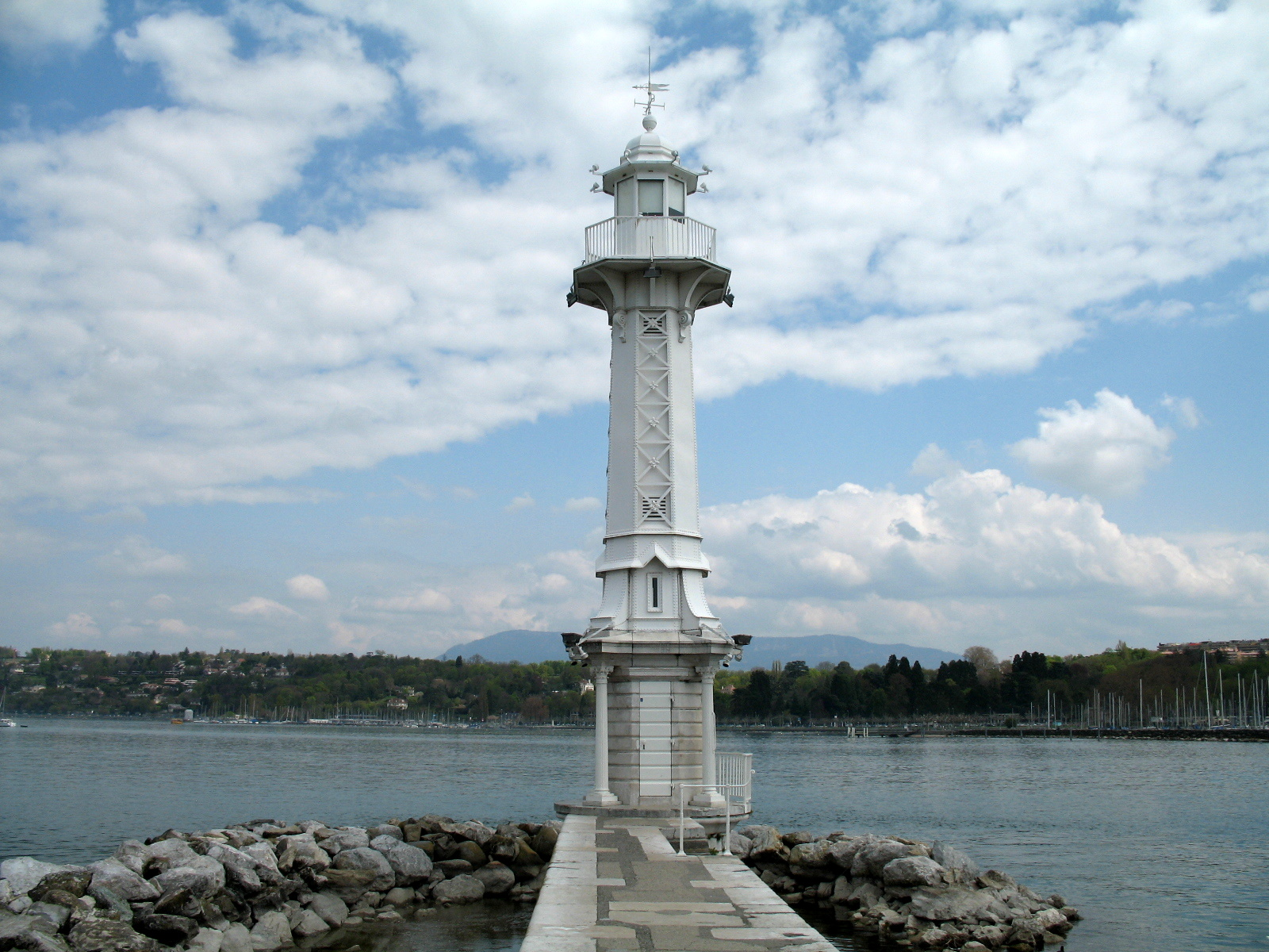 Phare de la jetée des Paquis à Genève